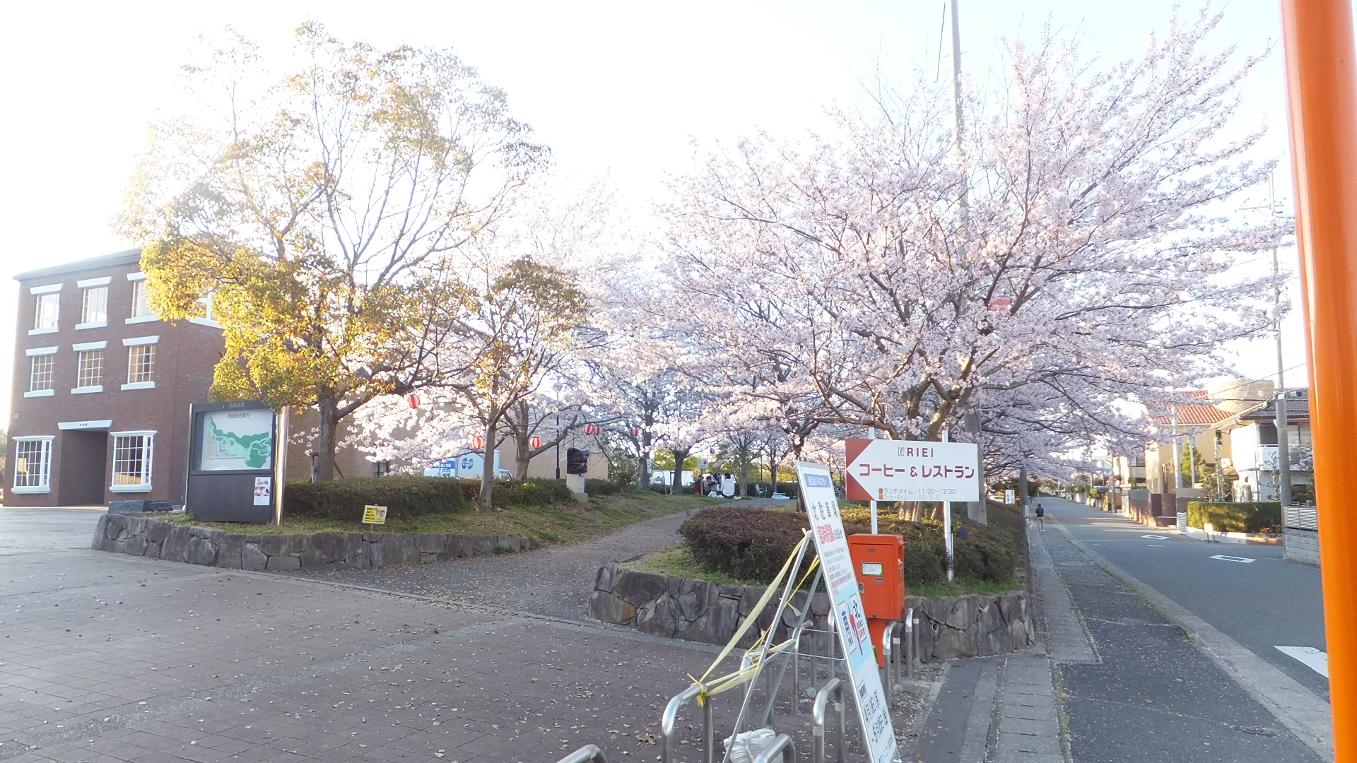 コープこうべ協同学苑に咲く桜